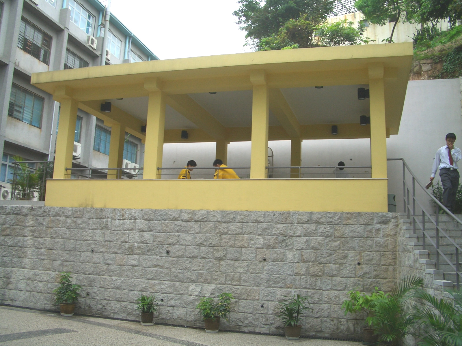 粵華中學內的聖母亭。